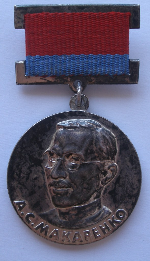 Медаль А.С. Макаренко УССР